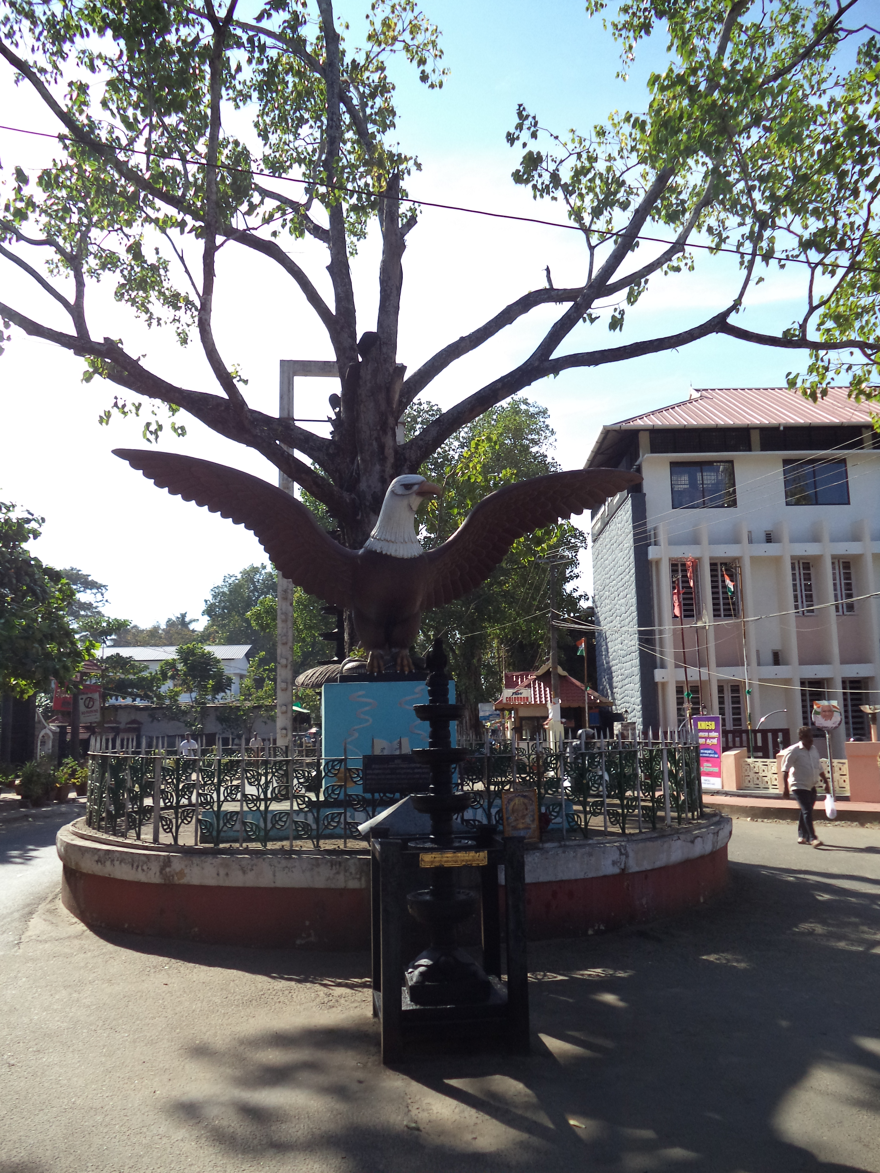 East Nada, Guruvayur, Kerala, India